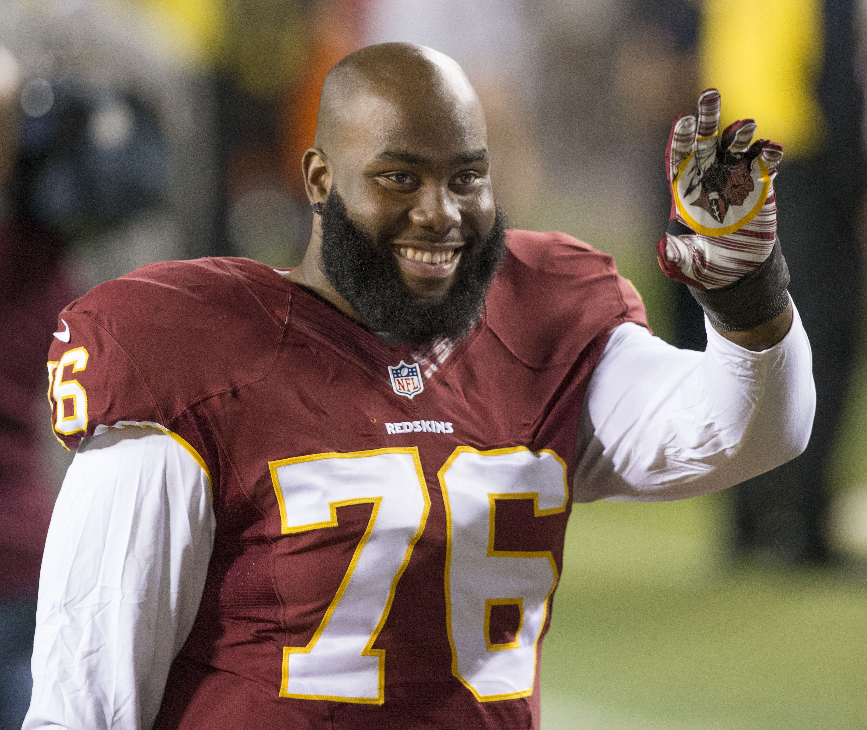 Giants at Redskins 9/25/14